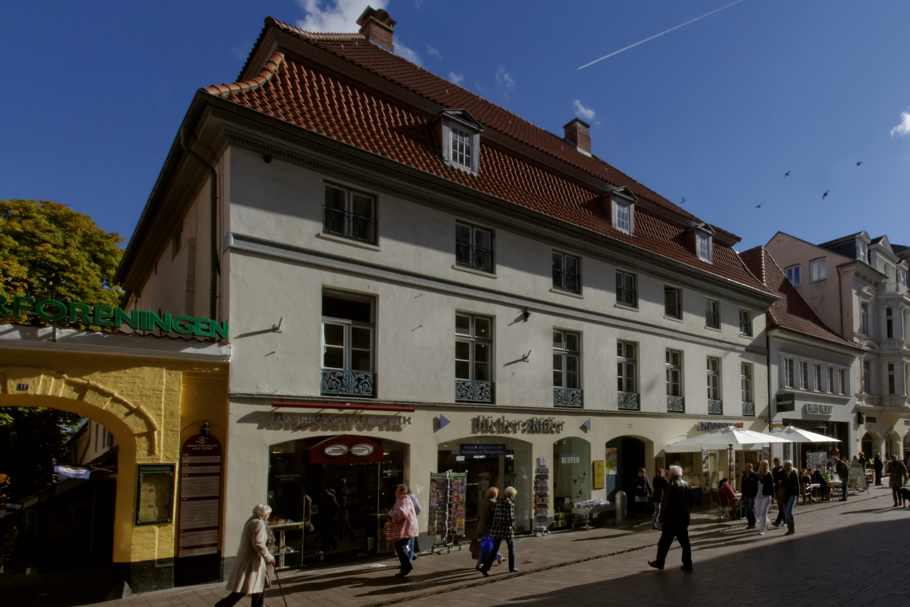 Flensburg, Holm 19-21; Kaufmannshof Vorderhaus